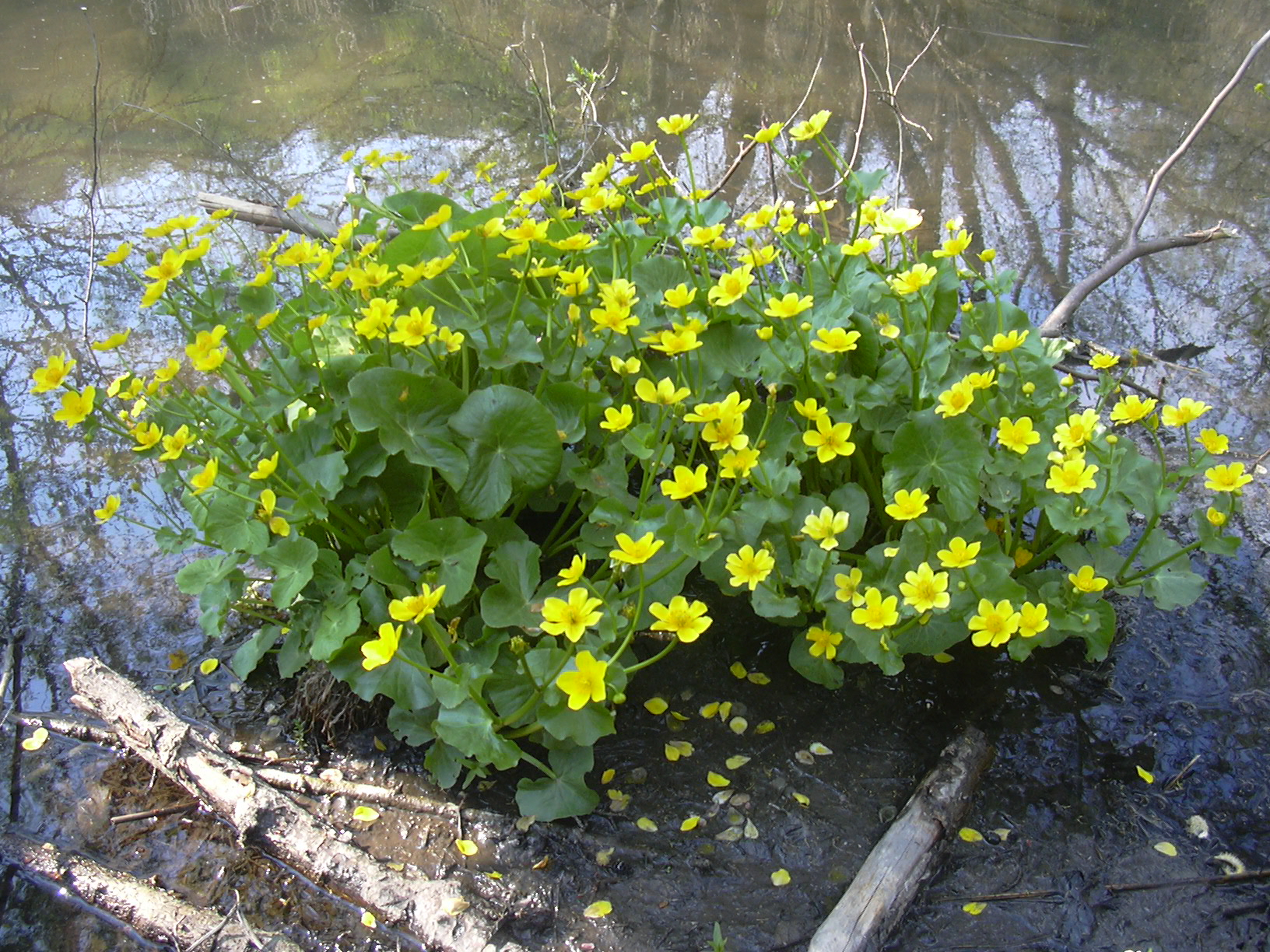 Blatouch bahení z vodní nádrže Hádek (czech republic) (Caltha palustris)